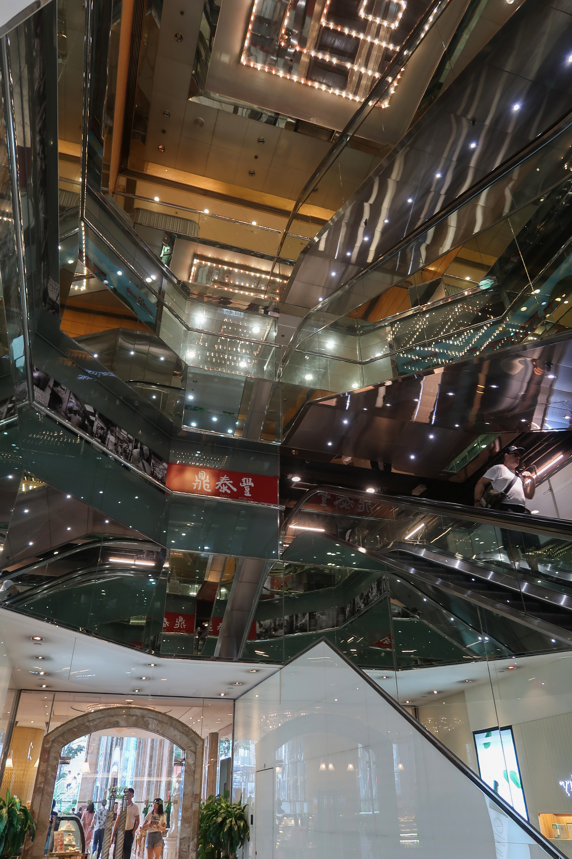 68 Yee Wo Street Void